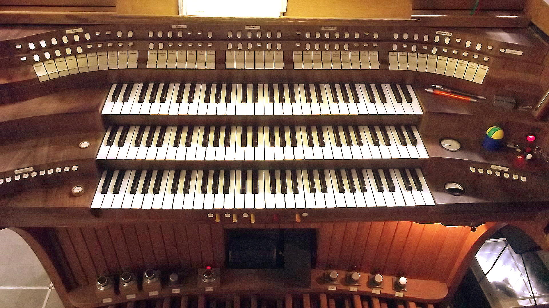 Klais-Orgel von St. Elisabeth Saarbrücken